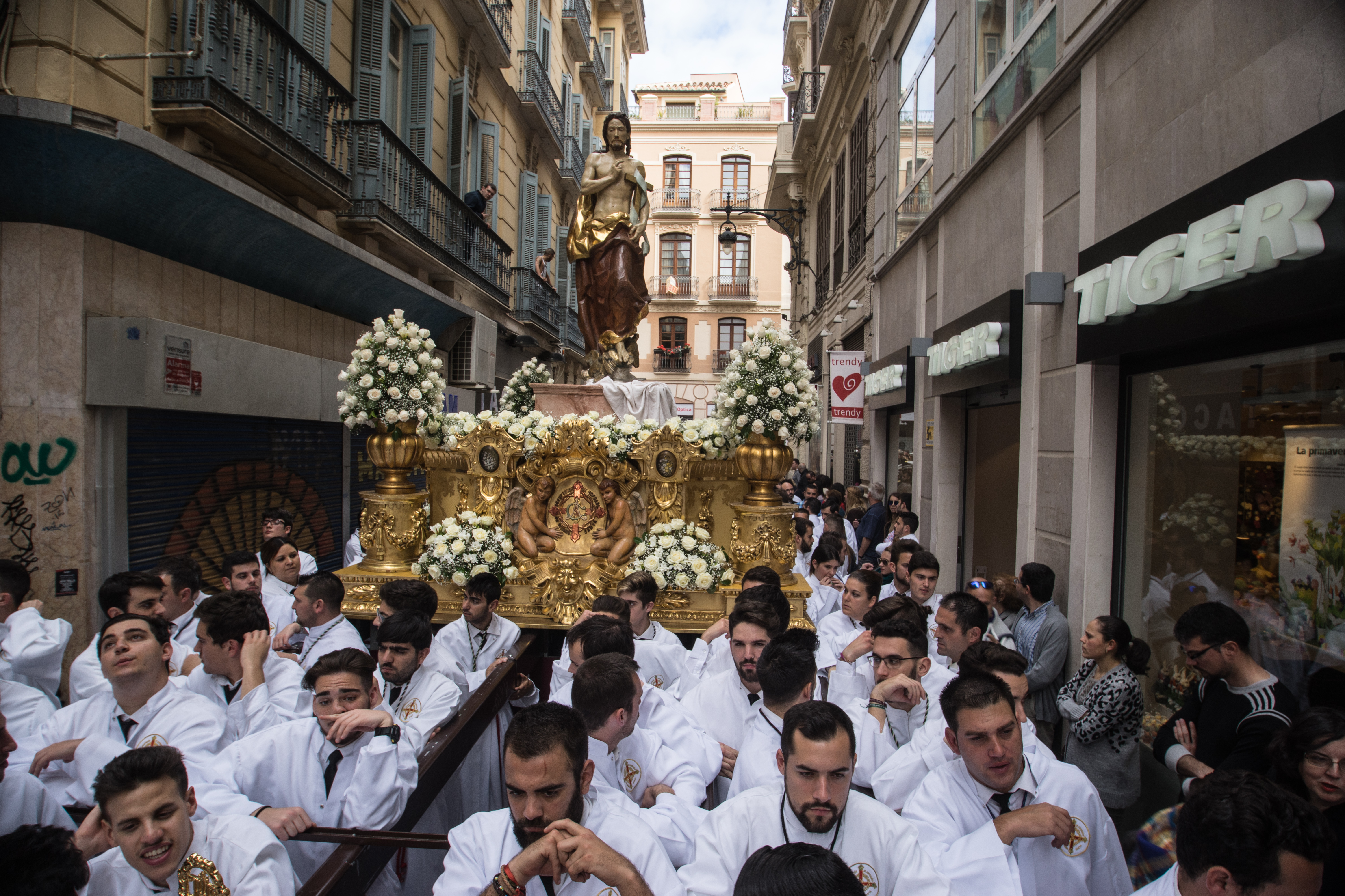 Procesión de la Agrupación de Cofradías de Málaga This is a photography of a Folklore festival in Spain (Wikidata id Q9075883).